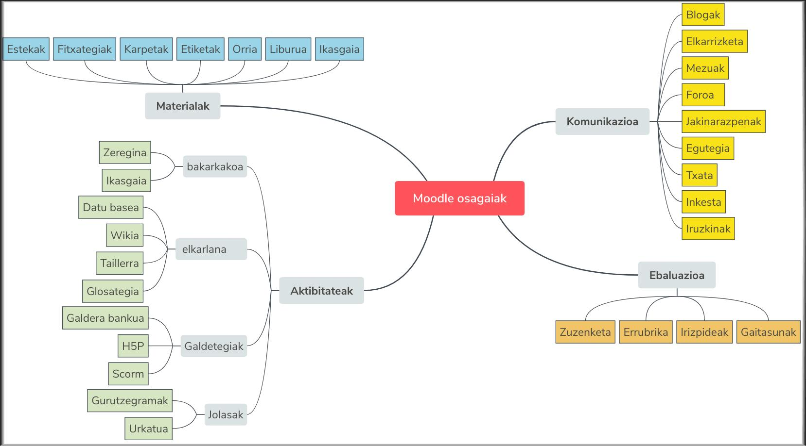 Moodle-ren hainbat modulu eta tresnak funtzionalitatearen arabera sailkatuak